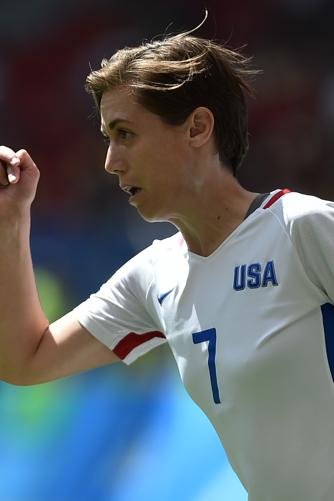 Estádio Nacional de Brasília Mané Garrincha, Brasília, DF, Brasil, 12/8/2016 Foto: Andre Borges/Agência Brasília Estados Unidos e Suécia jogam nesta sexta-feira (12), no Estádio Mané Garrincha, pelas quartas de final do futebol feminino na Olimpíada 2016.